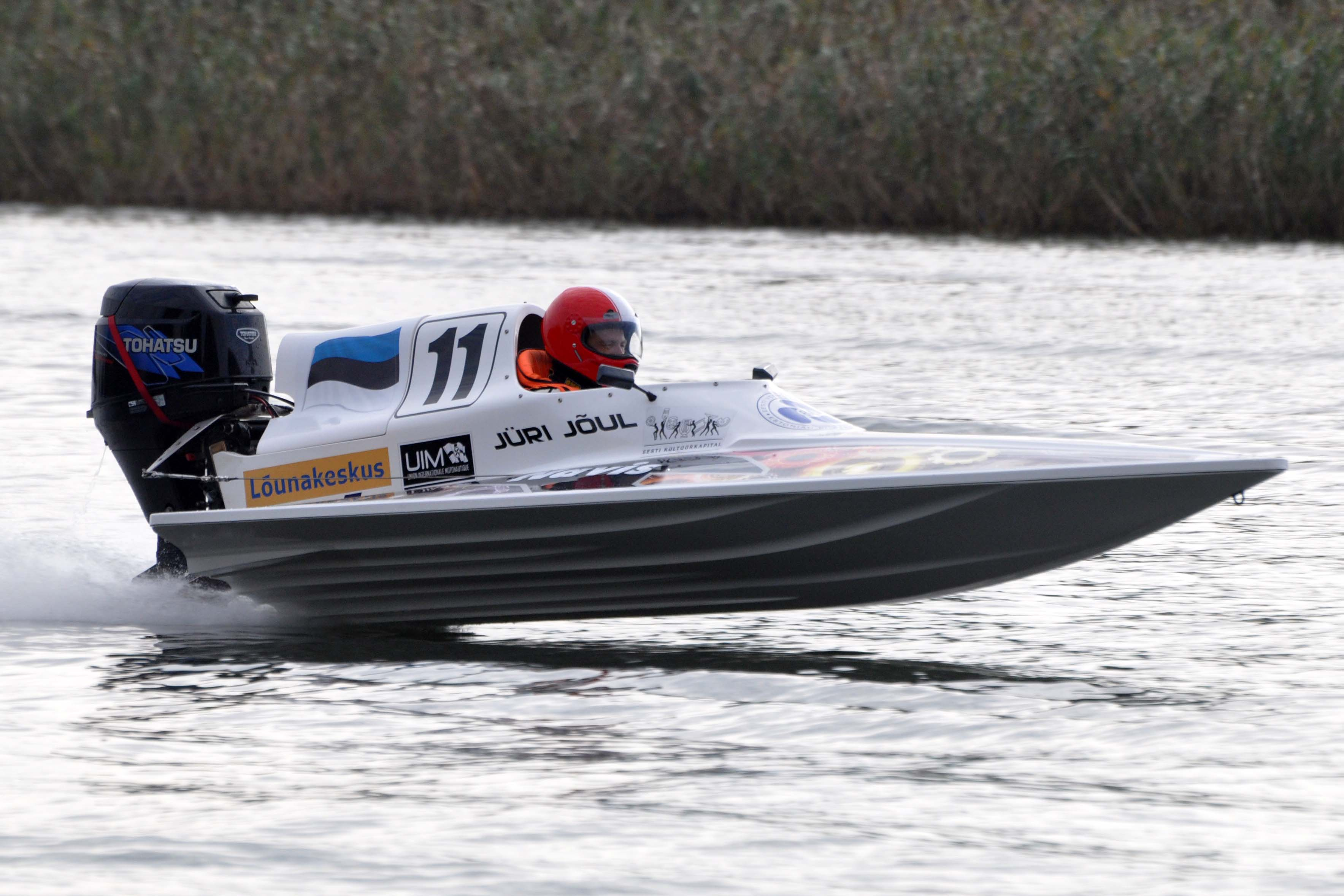 Jüri Jõul GT-30 ja PR4 maailmameister veemotos